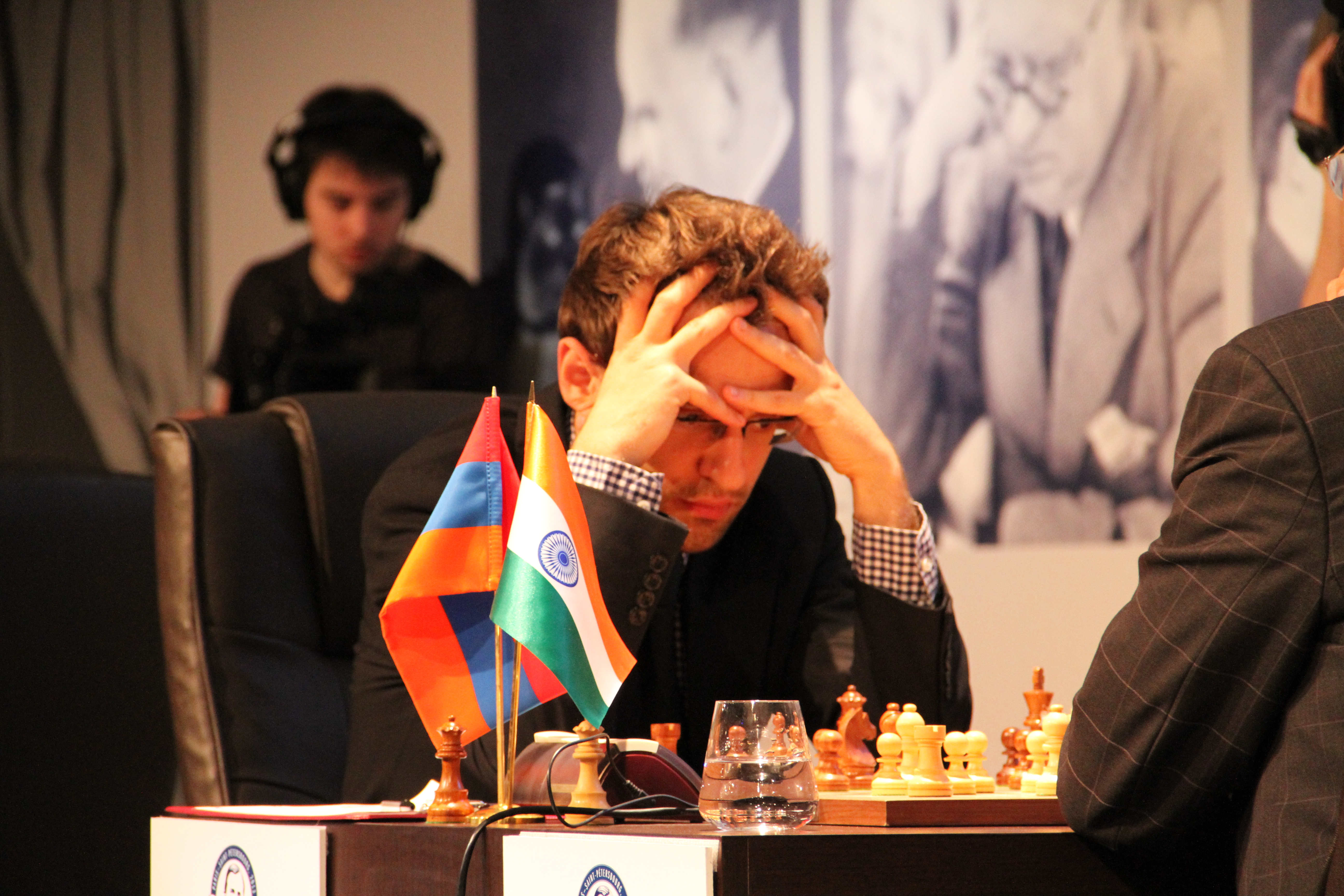 Levon Aronian au Mémorial Alekhine 2013 (Paris)